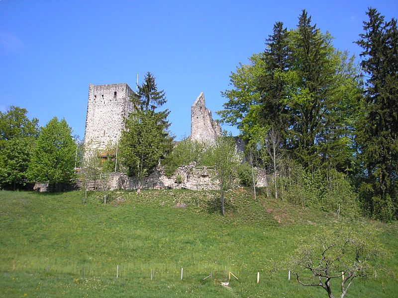 Burg Sulzberg (Markt Sulzberg, Landkreis Oberallgäu, Bayerisch-Schwaben). Die Ostseite der Burg. Eigene Aufnahme, Mai 2008 / Sulzberg castle near Sulzberg (Landkreis Oberallgäu, Bavaria, Germany). Eastern side of the castle. Own photo, May 2008